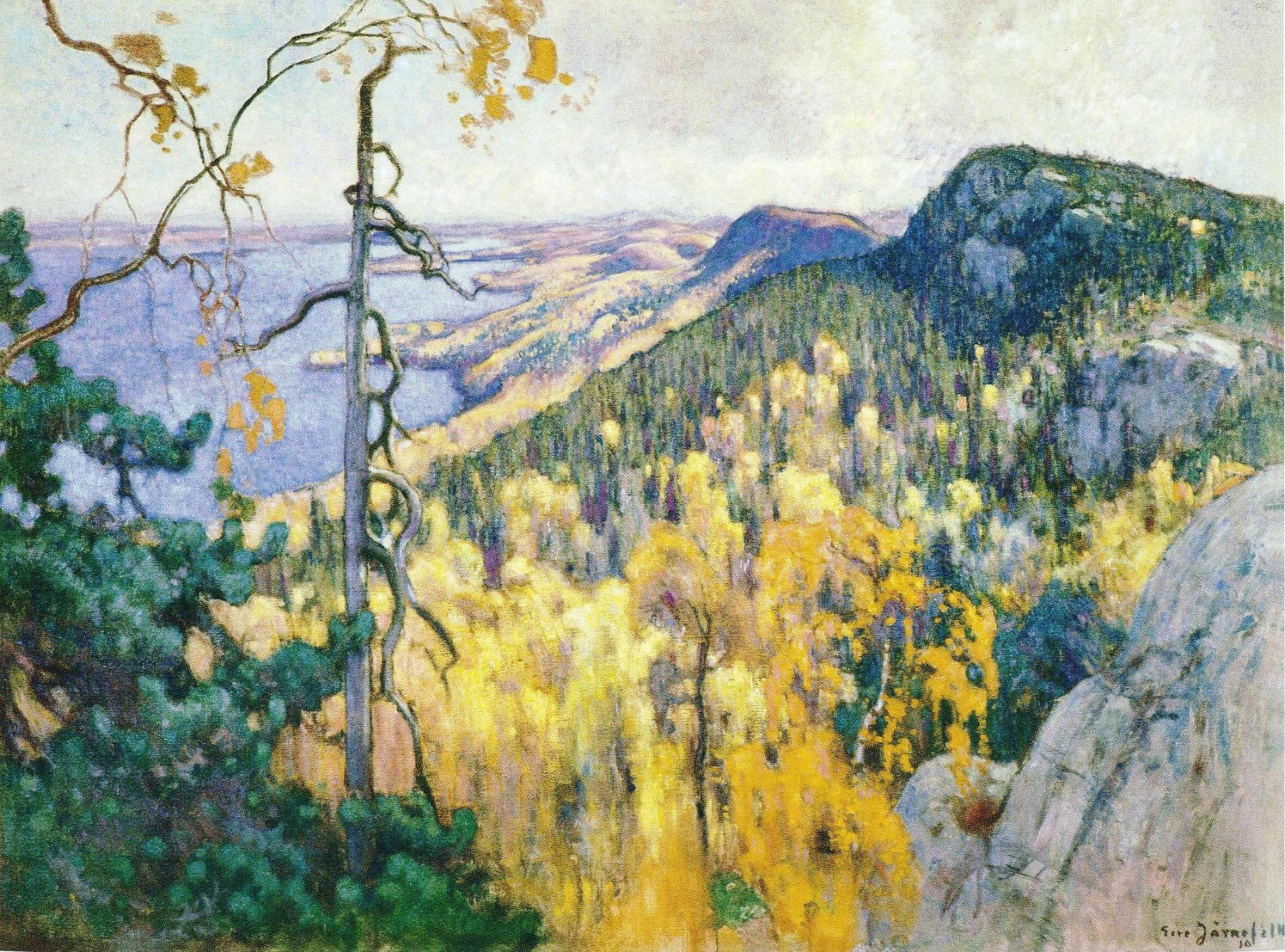 Eero Järnefeltin maalaus Syysmaisema Kolilta. Teoksen omistaa Lahden taidemuseo.